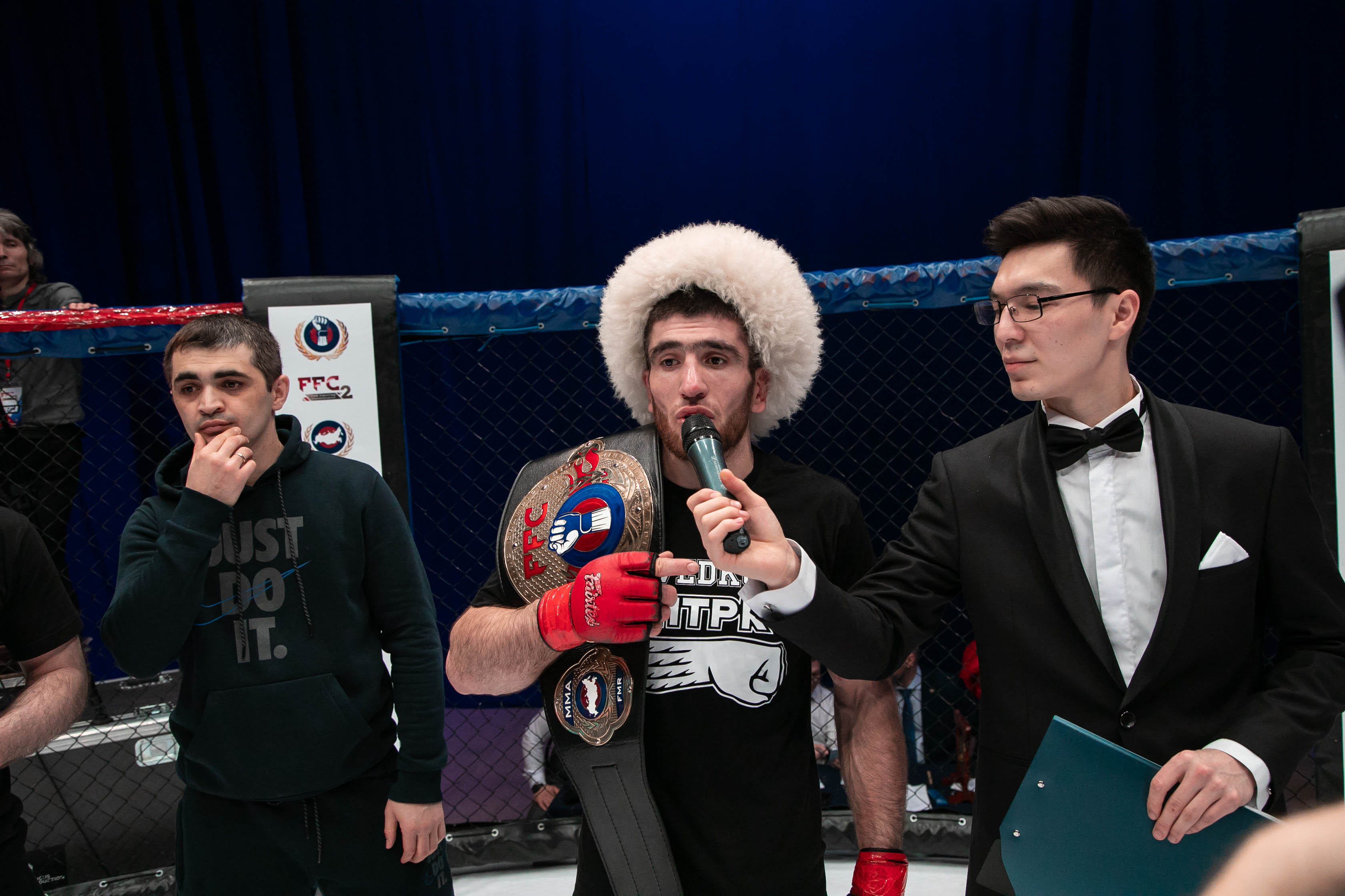 Чемпион FFC Курбан Зайнулабидов